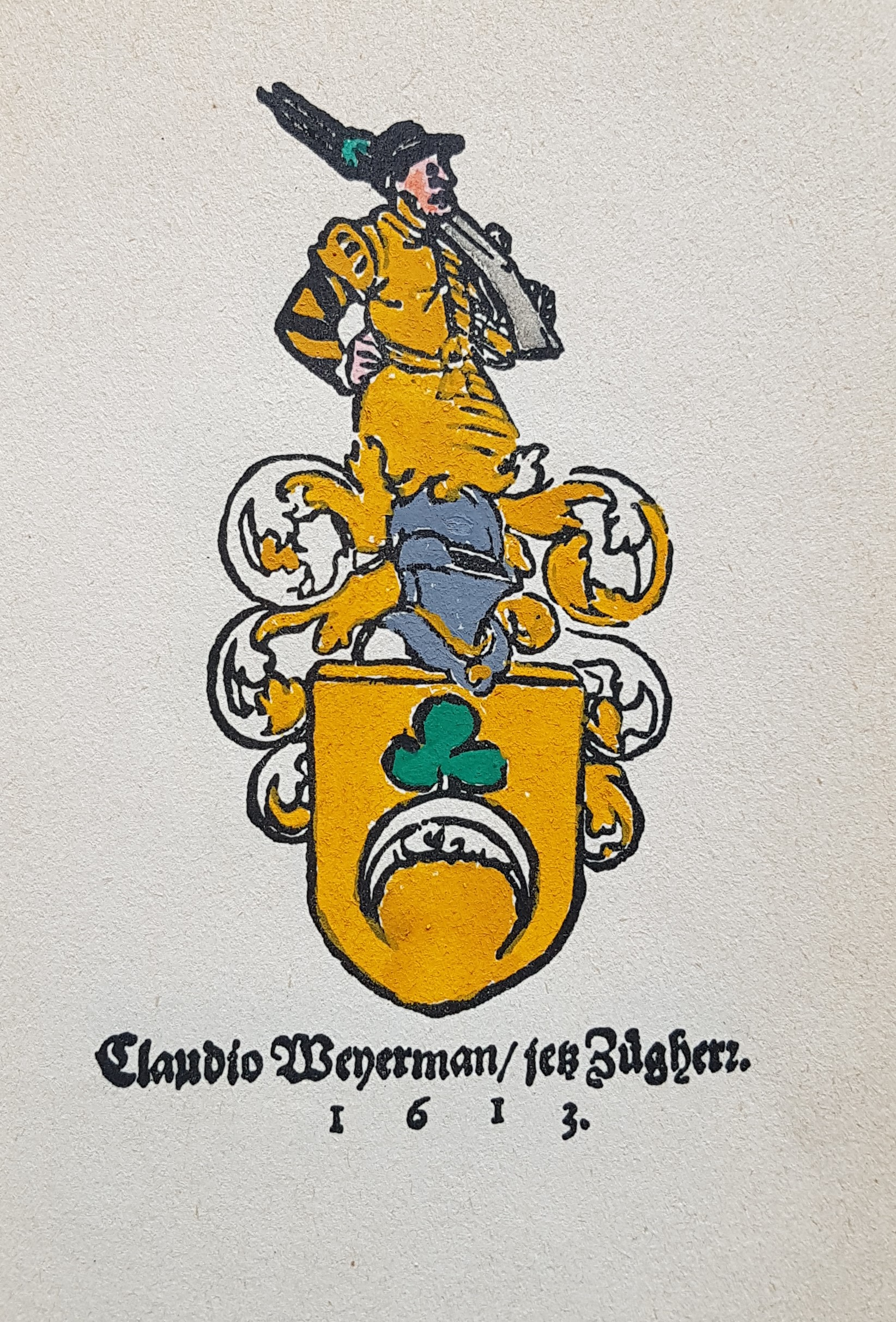 Waltter, Glado Weyermann